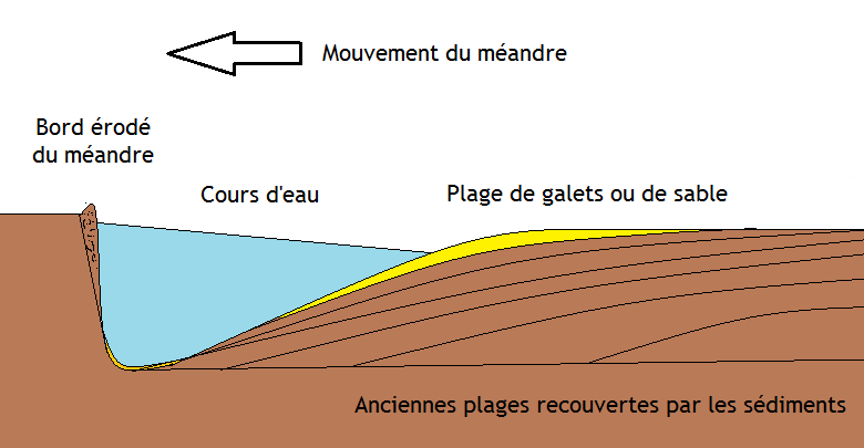 Coupe-section d'un méandre